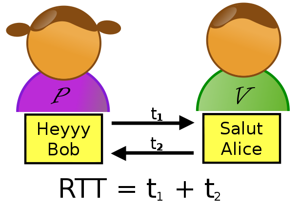 Démonstration du Round-Trip Time